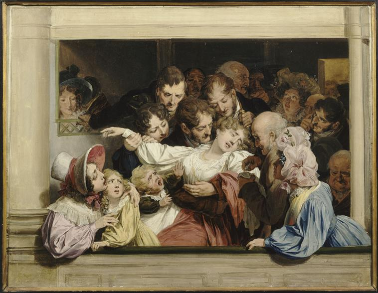 L'effet du mélodrame